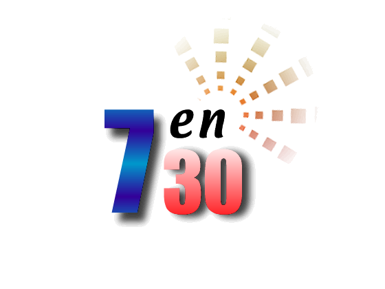 Logo del noticiera 7 en 30